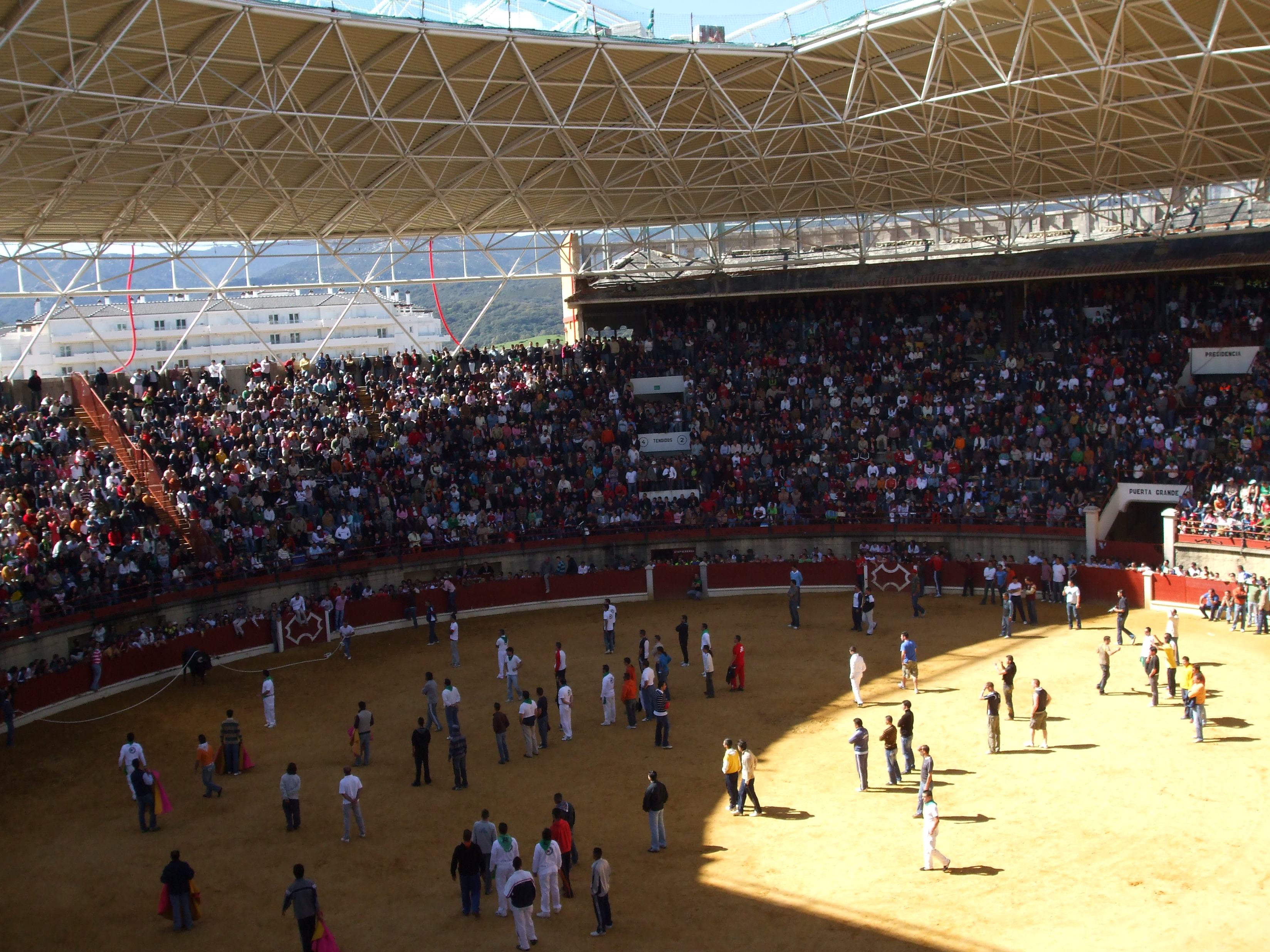 Los mozos y mozas esperando al toro